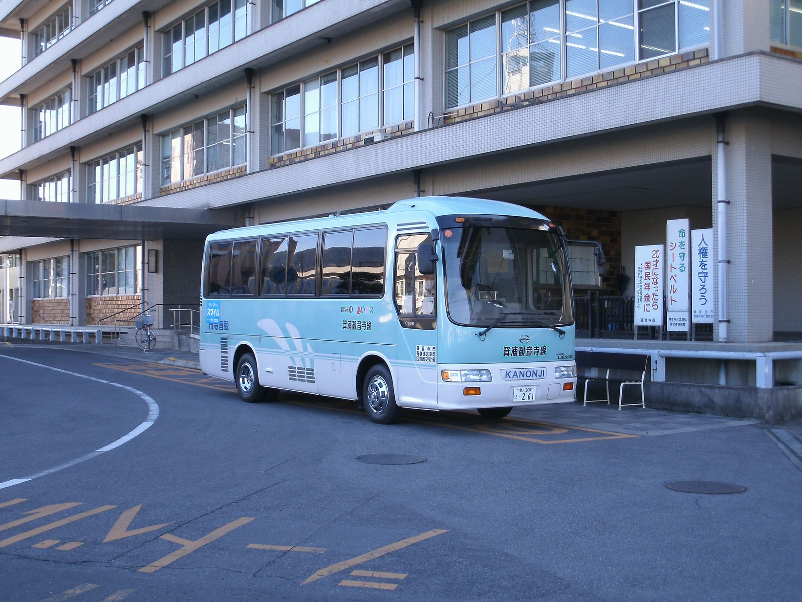 観音寺市役所前に停車するja:観音寺市のりあいバス車両 箕浦観音寺線